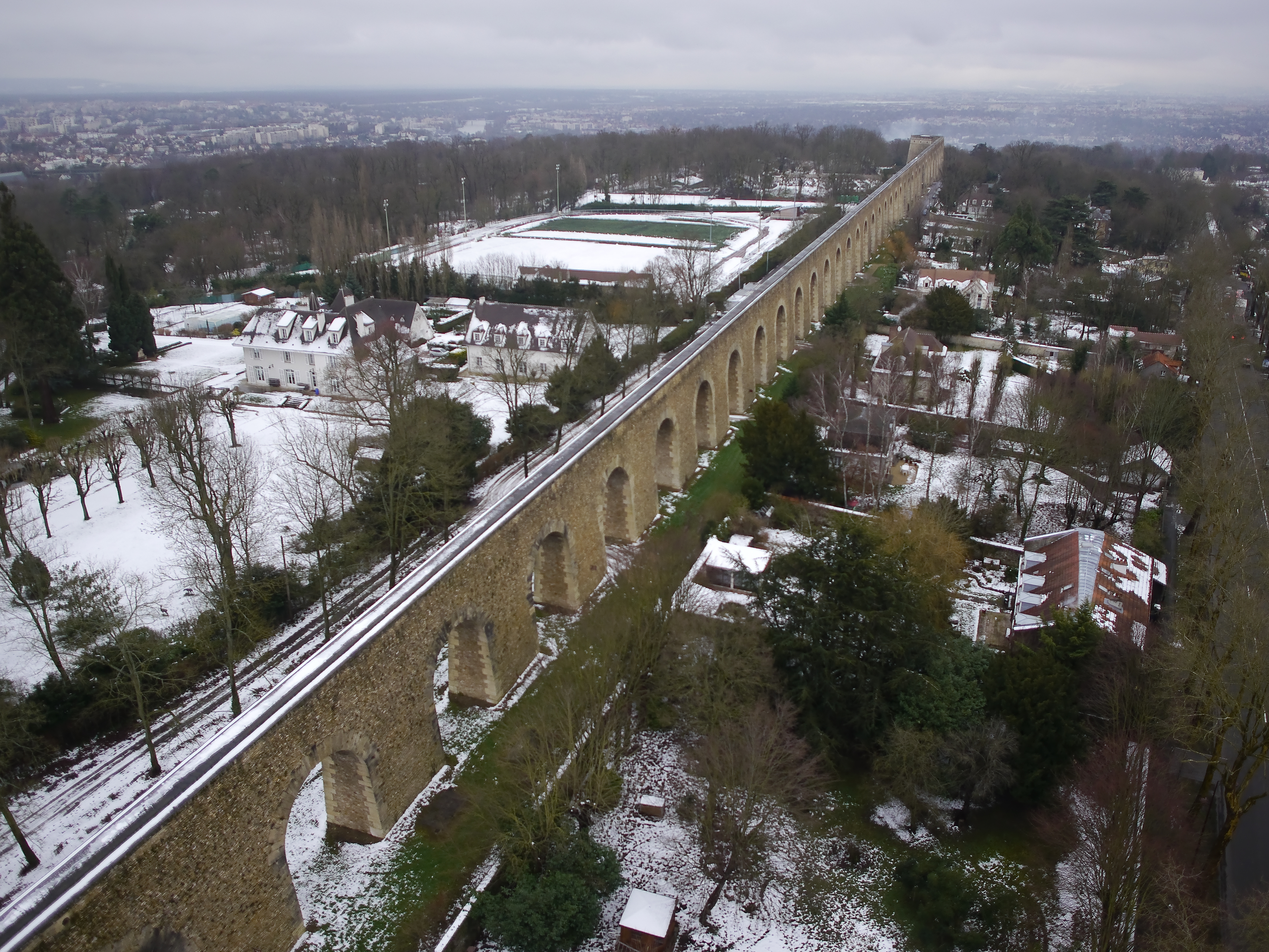 Photo aérienne de l'aqueduc de Louveciennes aussi appelé aqueduc de Marly, à Louveciennes dans la banlieue ouest de Paris.